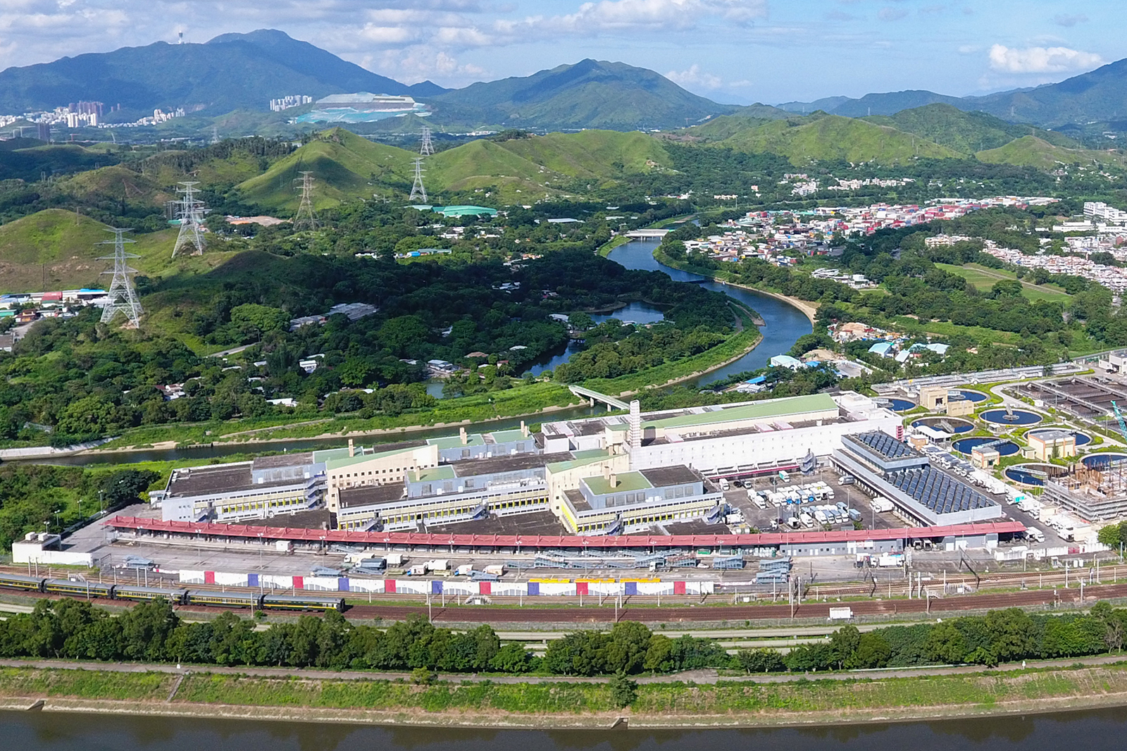 Sheung Shui Slaughter House